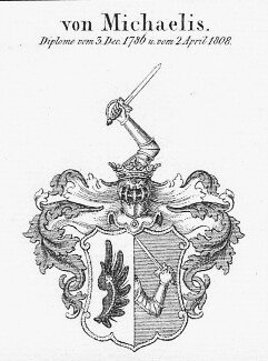 Wappen derer von Michaelis, 1786 preußischer Adelsstand, 1808 erweitert.